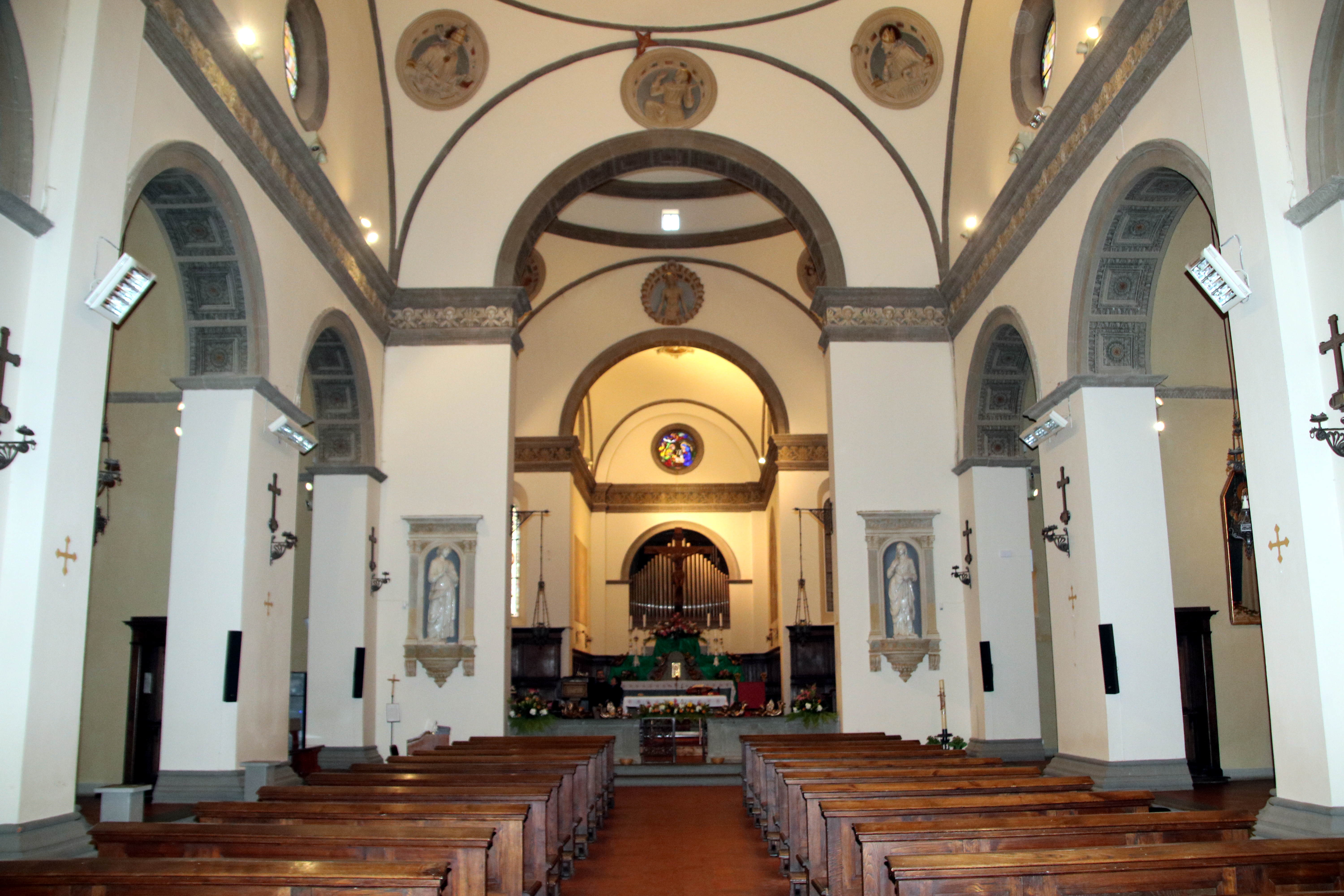 Basilica dell'Osservanza, Siena